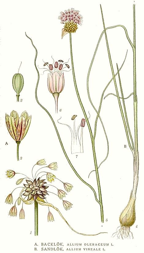 A. Allium oleraceum L. B. Allium vineale L. Original Description A. Backlök, Allium oleraceum L. B. Sandlök, Allium vineale L.